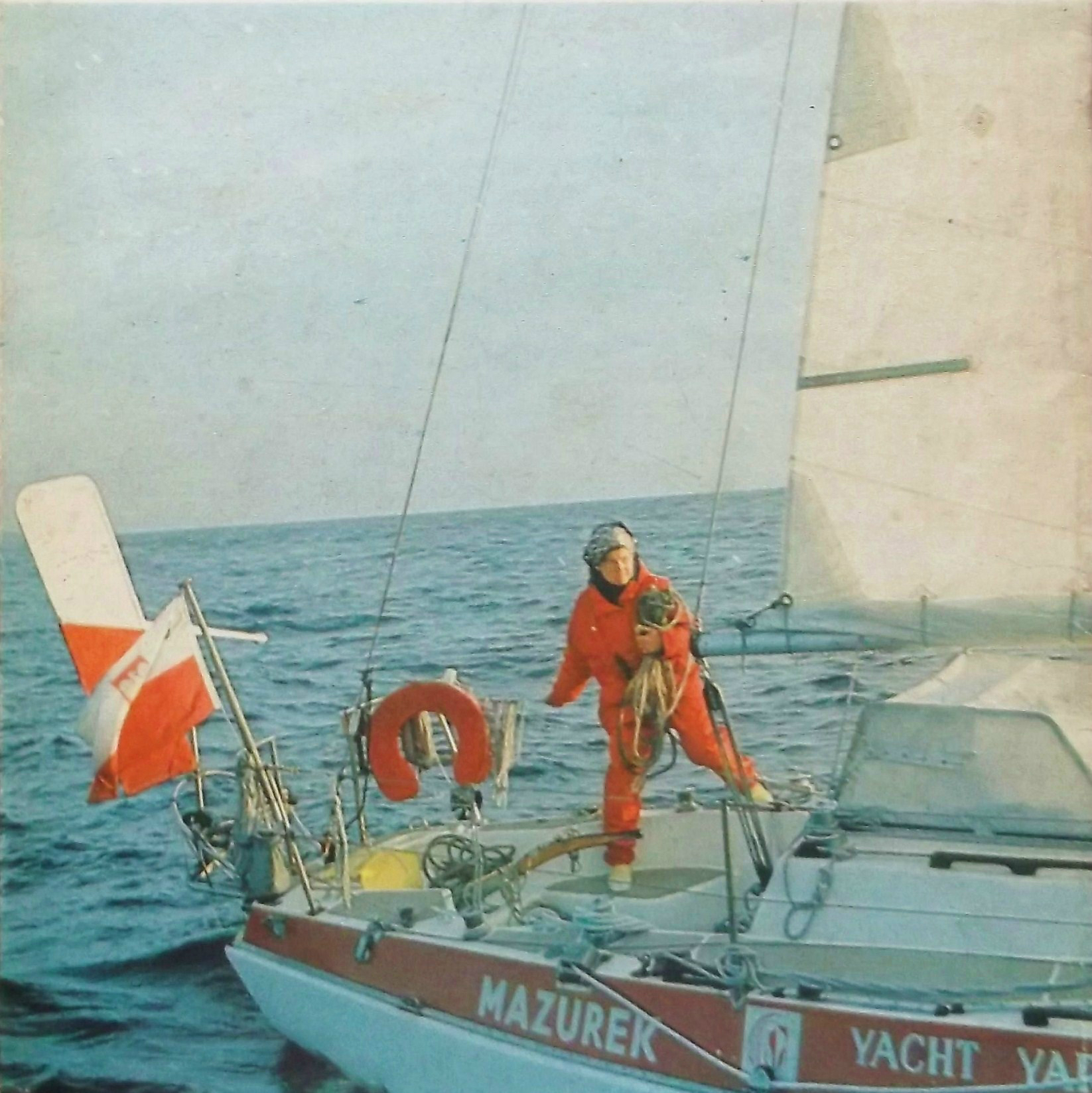 Żeglarz inż. Krystyna Chojnowska-Liskiewicz na pokładzie jachtu SY Mazurek.